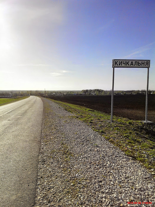 село Кичкальня